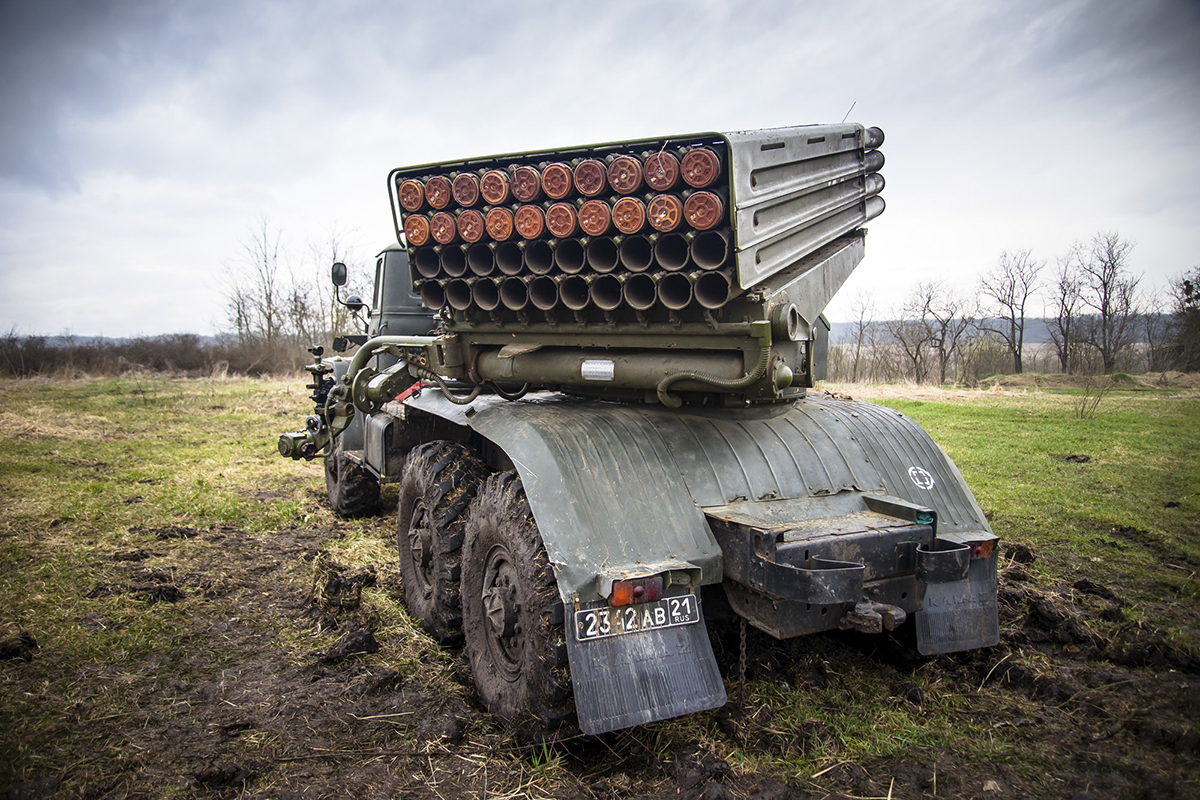 Тактическое учение с подразделениями мотострелковых бригад на полигоне Молькино, Краснодарский край.